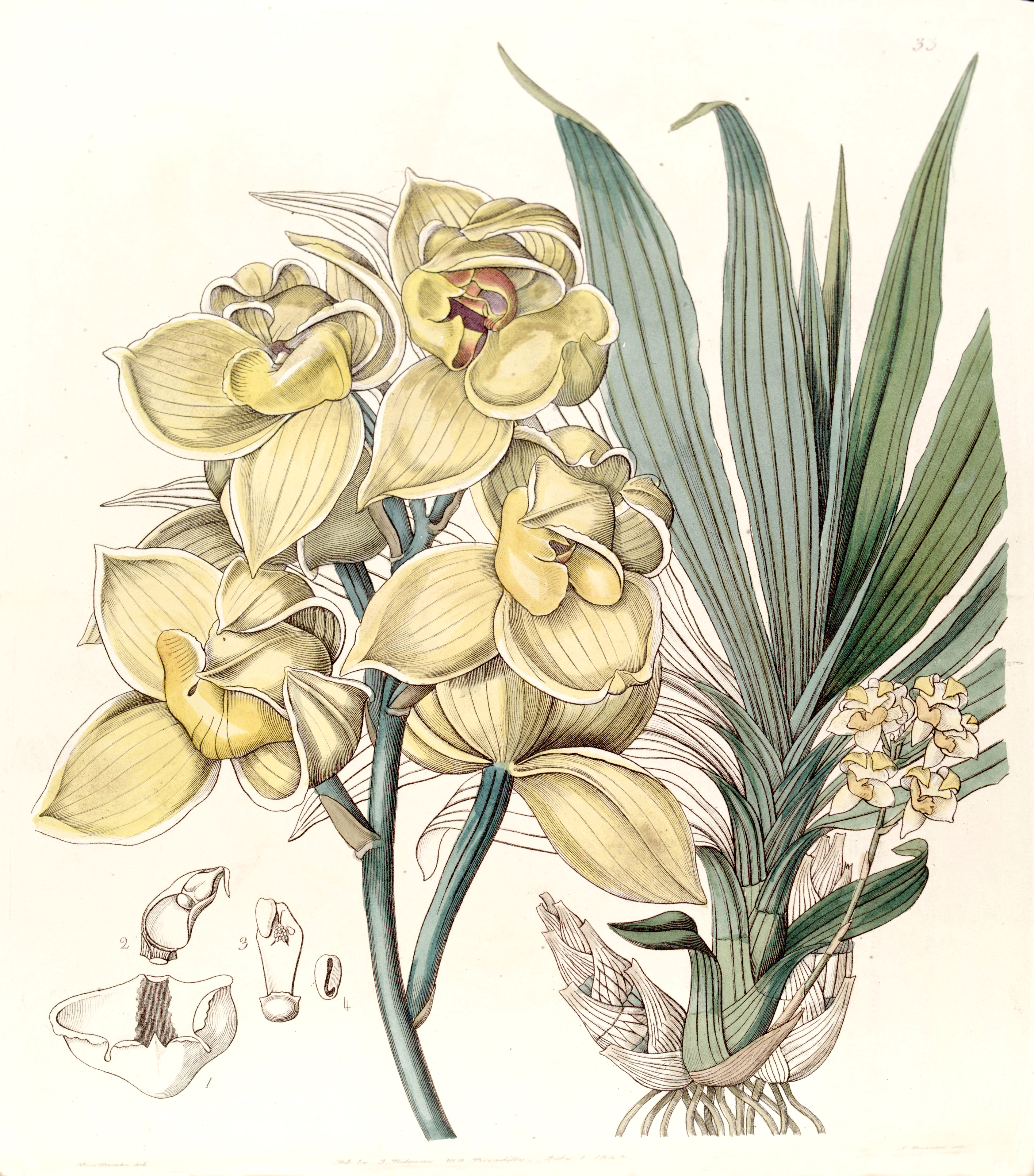 Mormodes luxata (as Mormodes luxatum)